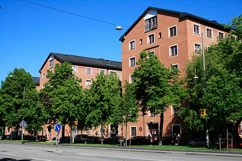 Bild på Blomsterfondens hus på Ringvägen.